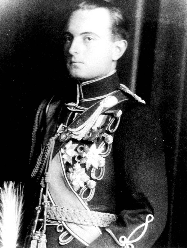 Српски (ћирилица): Кнез Павле Карађорђевић